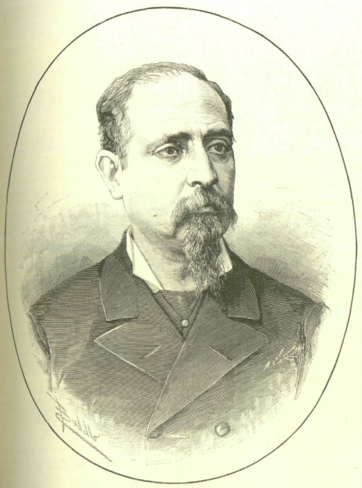 Excmo. Sr. D. Carlos Navarro y Rodrigo, diputado a Cortes.